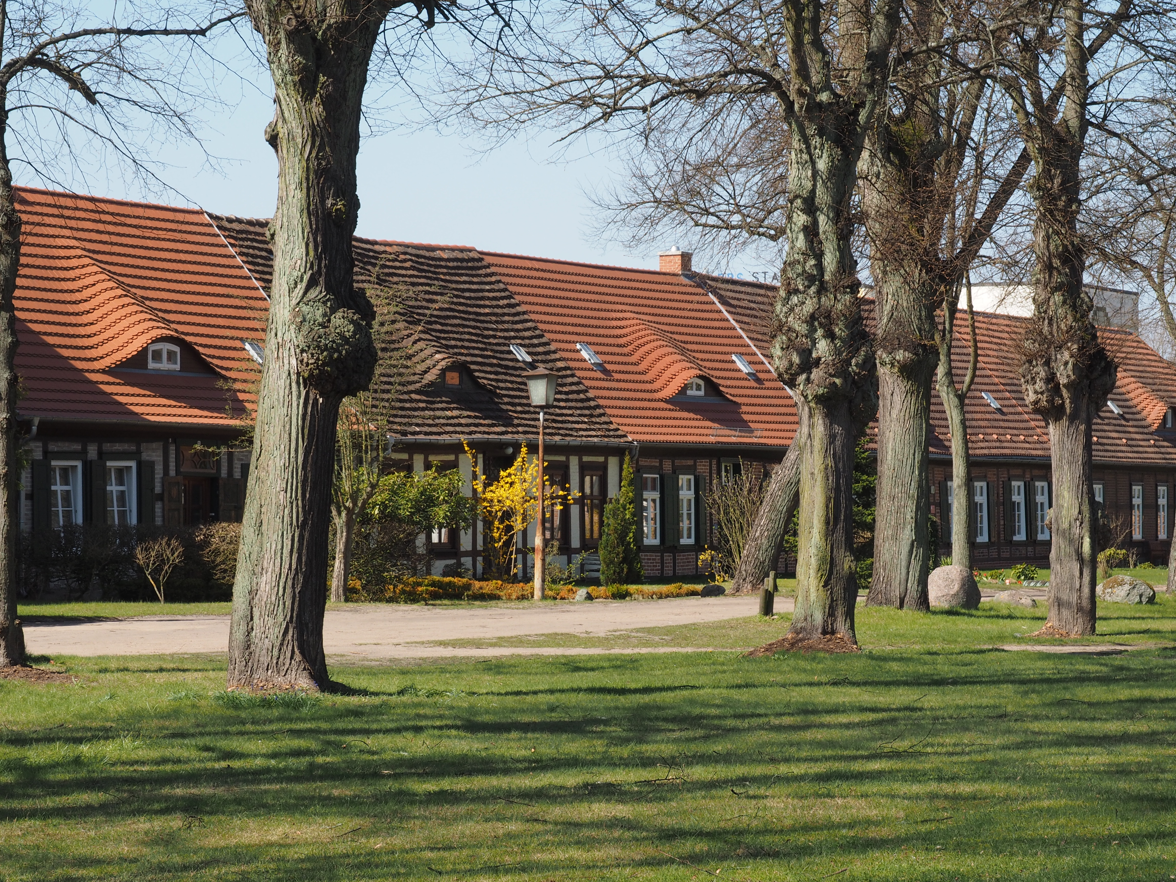 Von Johann Joachim Busch für Hofbeamte errichtete Stadthäuser auf dem Kirchenplatz nahe der Stadtkirche am Schloss Ludwigslust